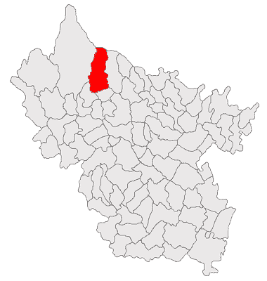 Categorie:Hărţi ale judeţului Buzău